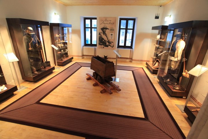 Expoziția de istorie a mineritului Aurul Apusenilor